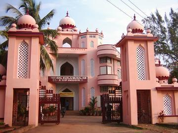 Thangal Kunju Musaliar College of Engineering, Kollam, Kerala